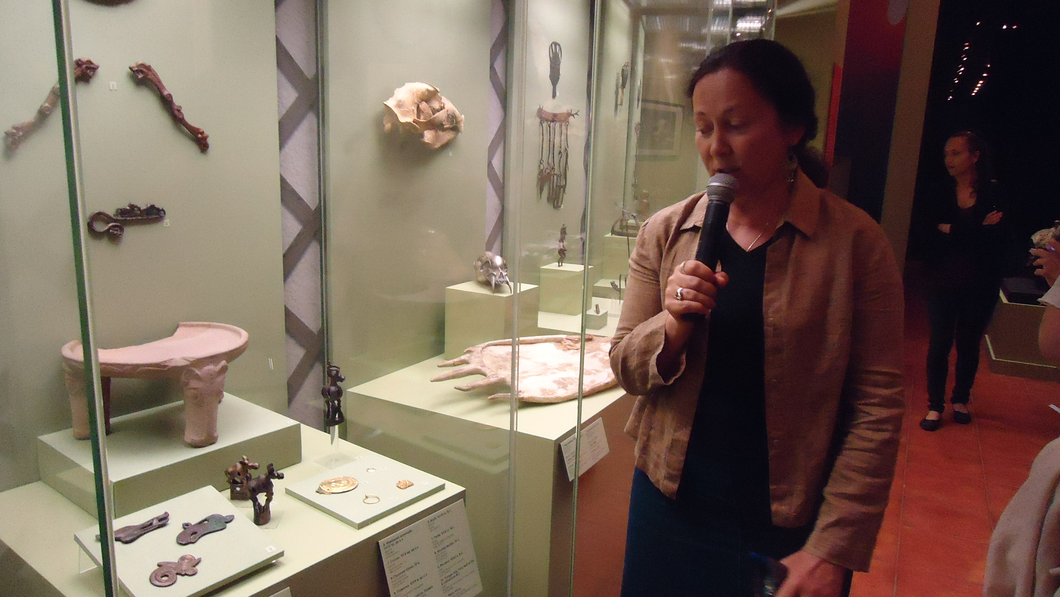 Экспозиция артефактов в Государственном Историческом Музее